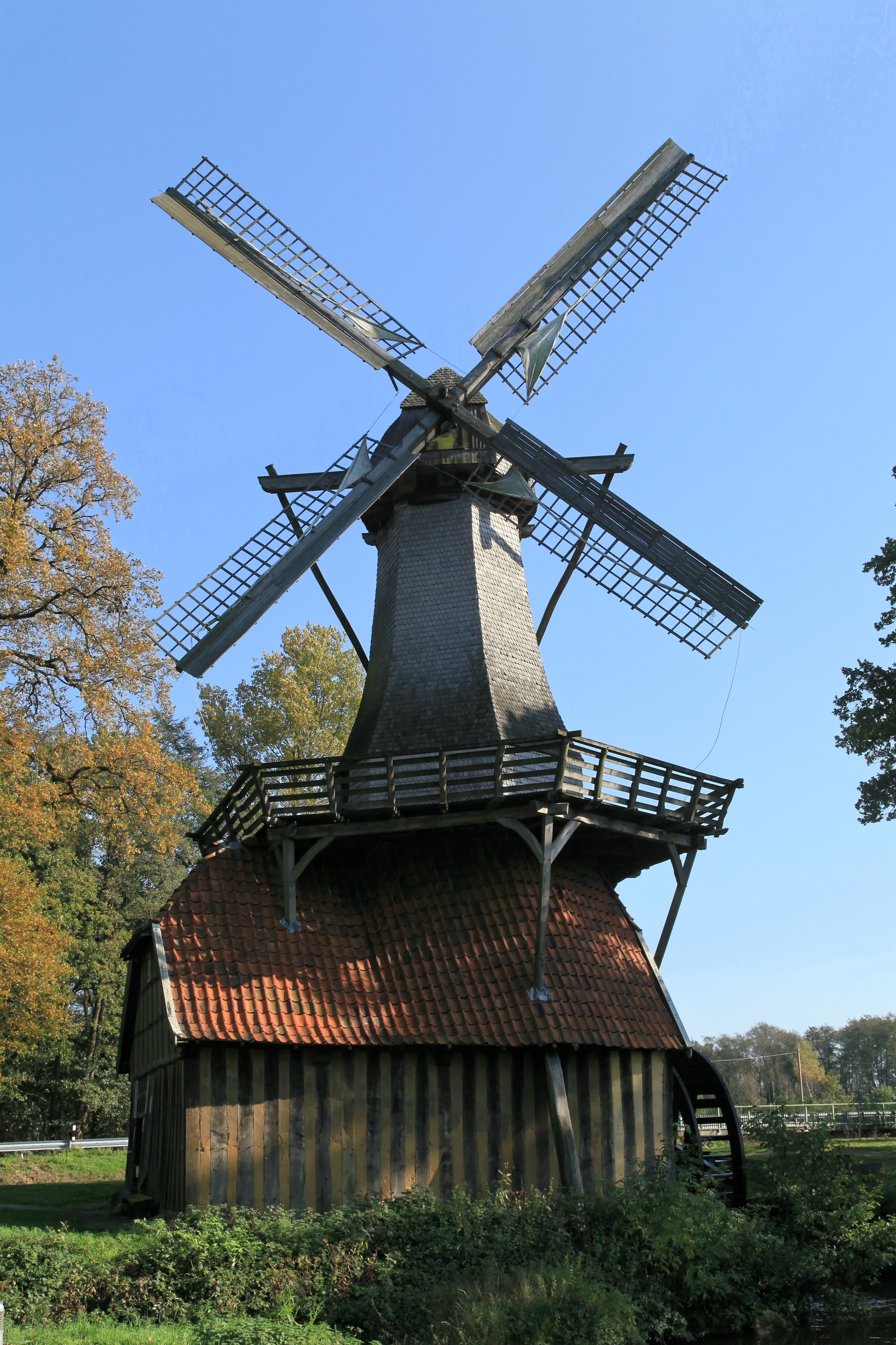 Hüvener Mühle, Straße Hüvener Mühle in Hüven